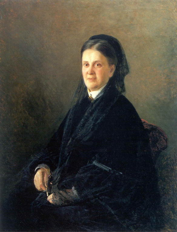 Ге Николай. Портрет А.М.Олсуфьевой. 1881